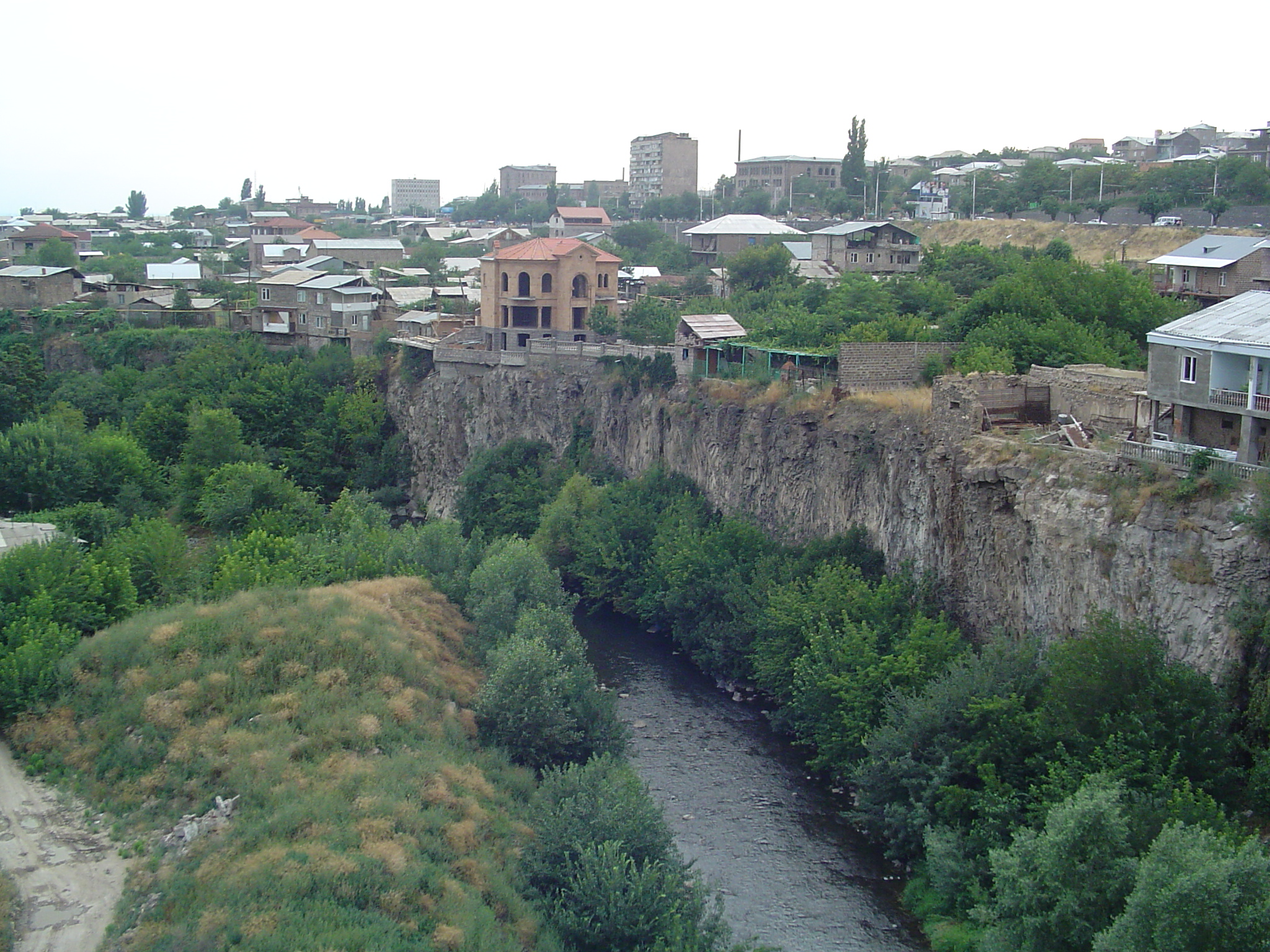 Hrazdan river